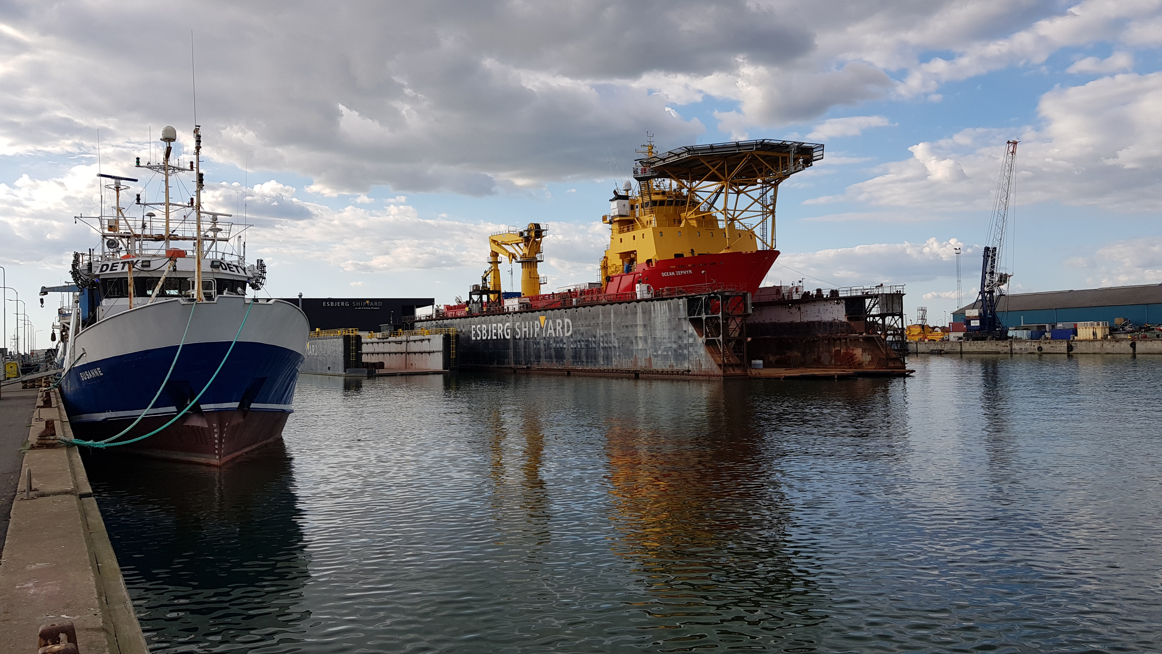 Esbjerg Shipyard